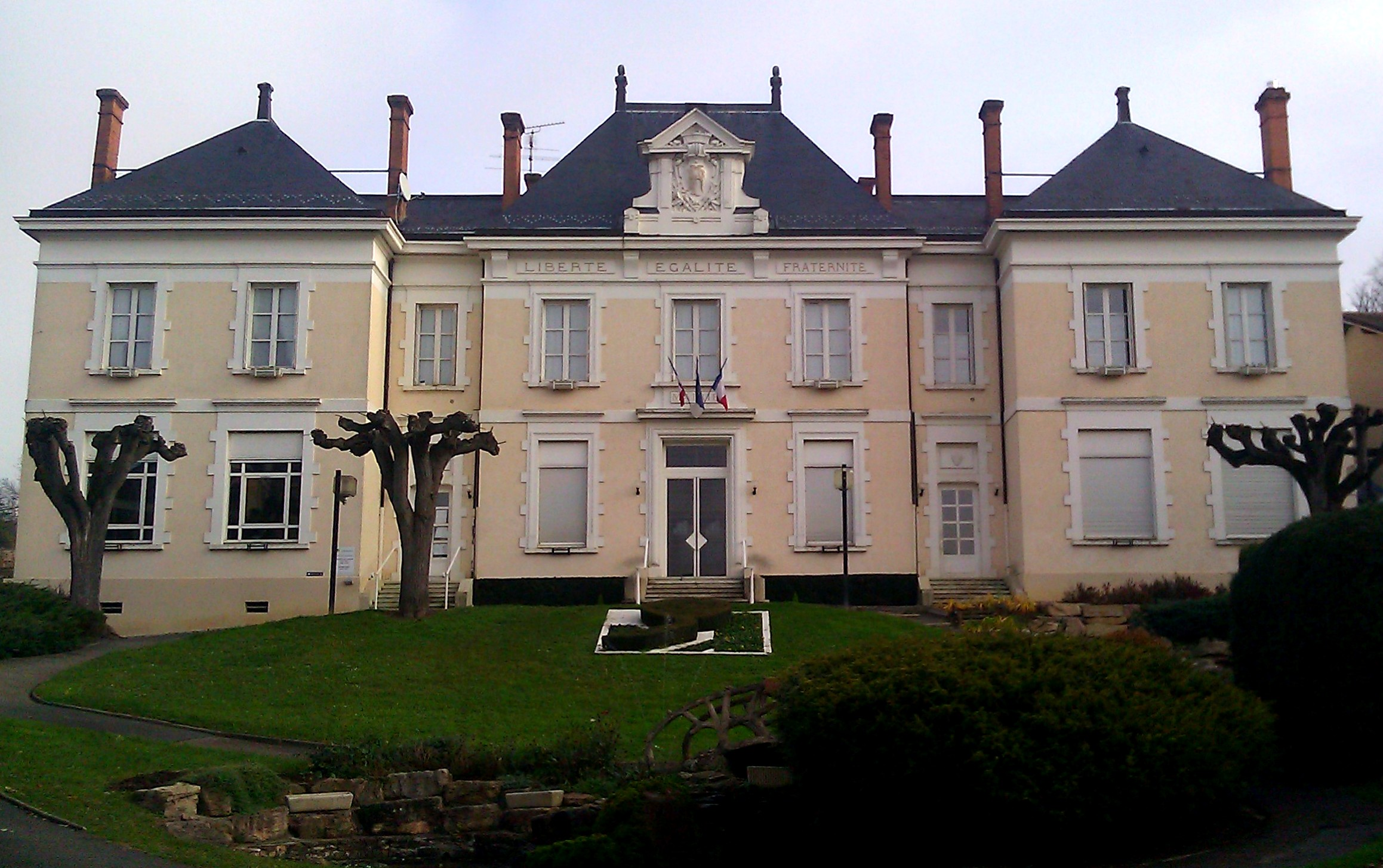 Mairie-école de Reyrieux (Ain, France), inaugurée le 16 octobre 1904 par le président de la république Emile Loubet. Delorme, architecte.